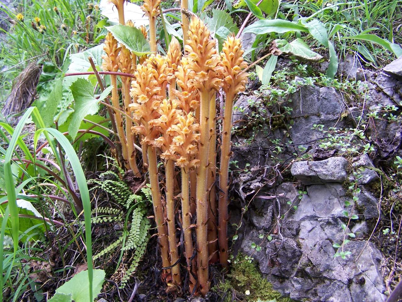 Orobanche flava (pl. zaraza żółta)